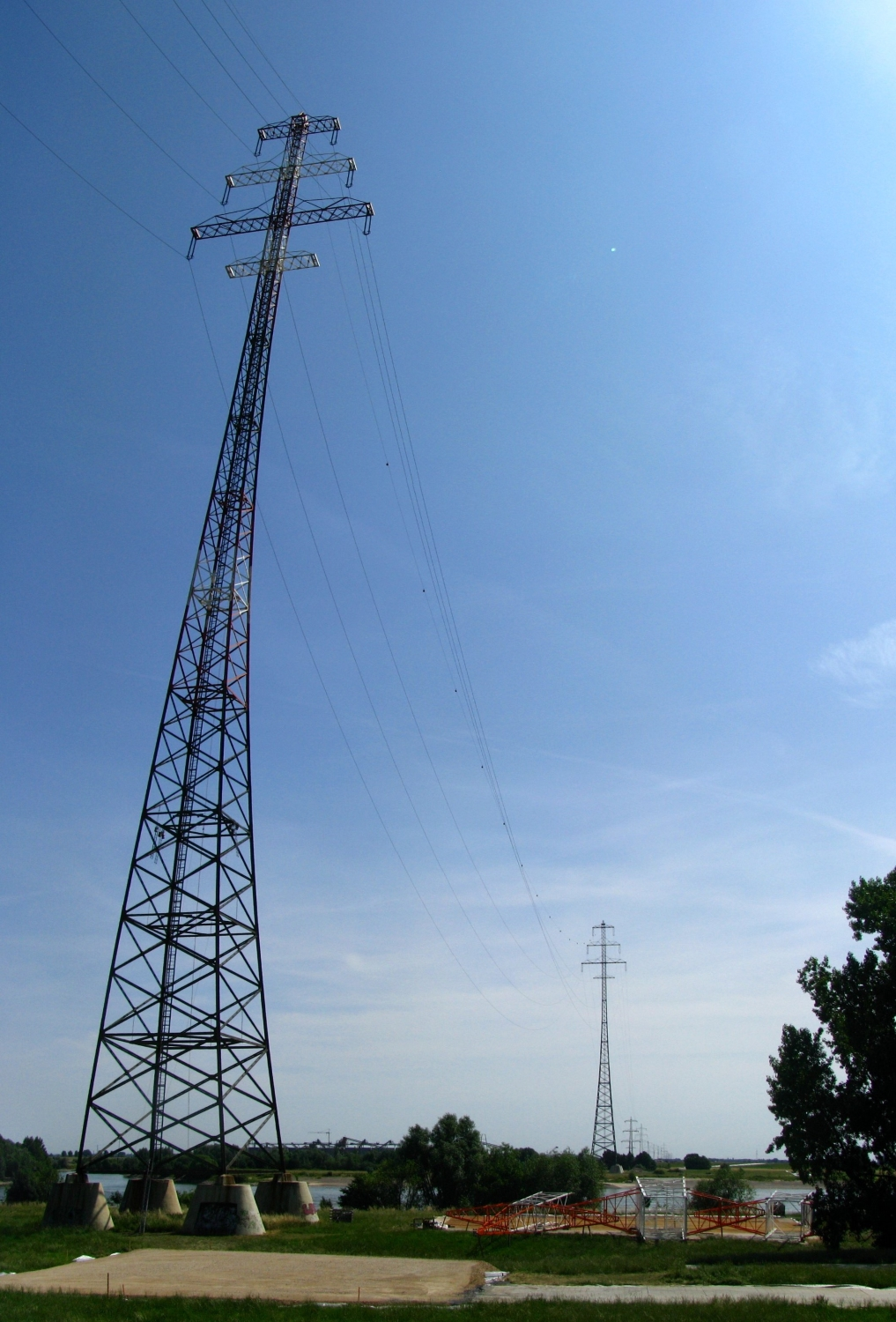 Freileitungskreuzung von Voerde während der Vorbereitung der Sanierungsarbeiten im Juli 2015, vorne nördlicher Mast in Götterswickerhamm